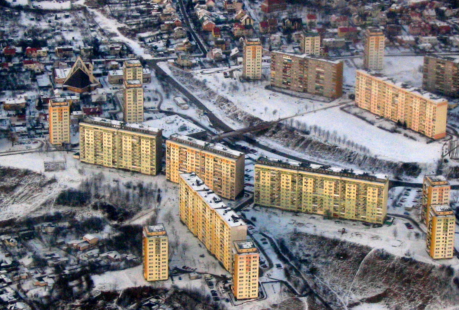 Dzielnica Gdańska: Suchanino. Zdjęcie lotnicze bloków przy ul. Powstańców Warszawskich. Widoczny na zdjęciu fragment ulicy Powstańców Warszawskich został poprowadzony w ciągu przygotowanej pod względem robót ziemnych niezrealizowanej na początku lat 30. XX wieku linii tramwajowej z Wrzeszcza.